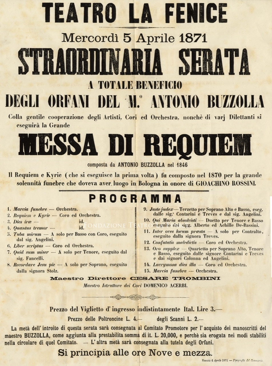 Locandina Requiem